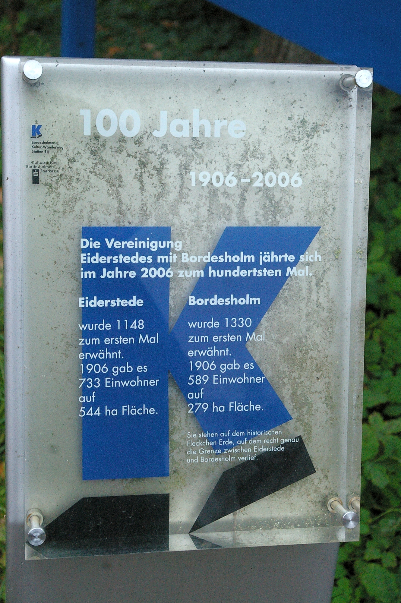 2006 errichtete Stele, die den historischen Grenzverlauf zwischen Eiderstede und Bordesholm markiert